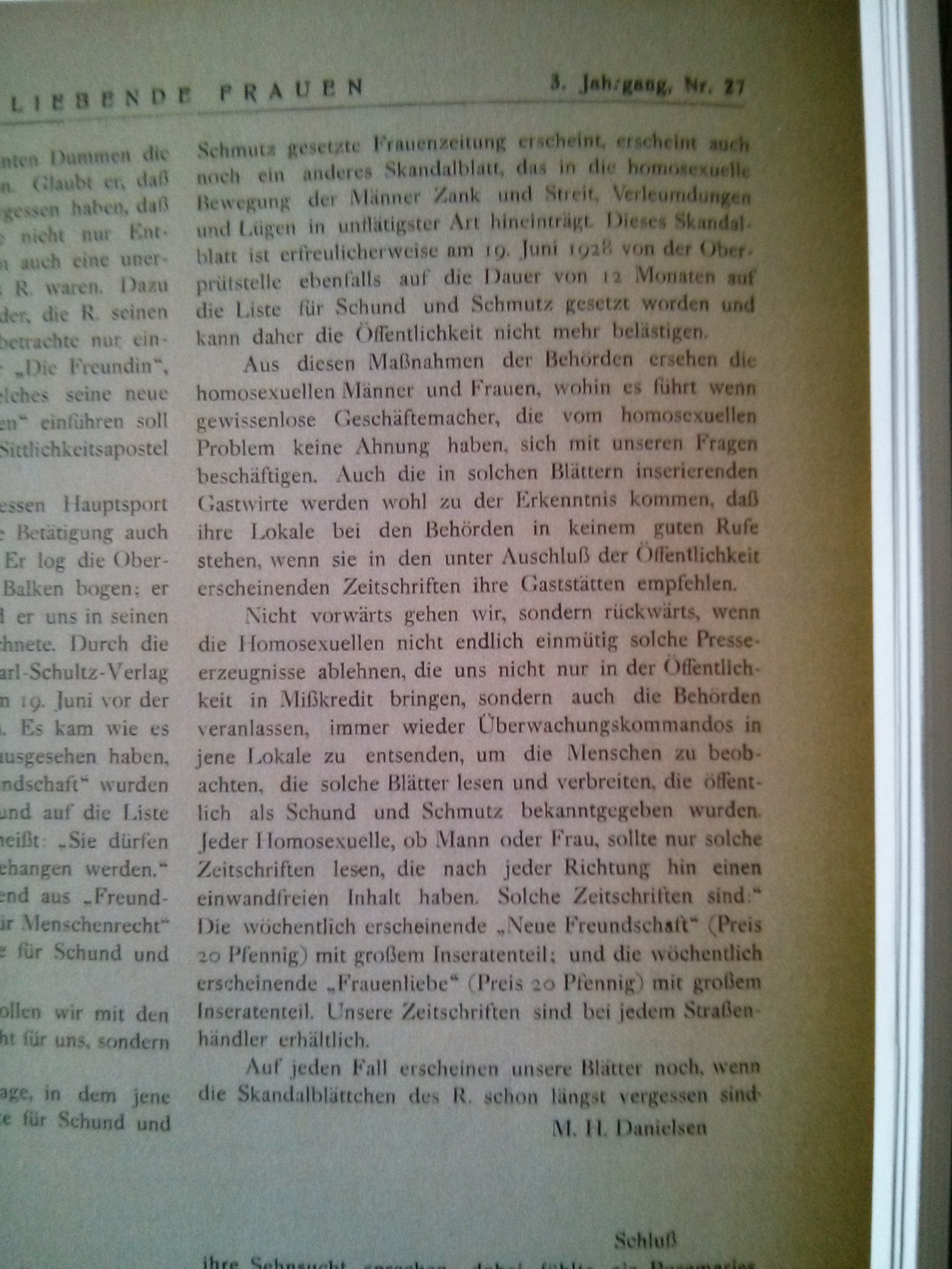 Aus der lesbischen Zeitschrift "Liebende Frauen", Berlin, 1928, Ausschnitt Seite 2 Ausgabe 27